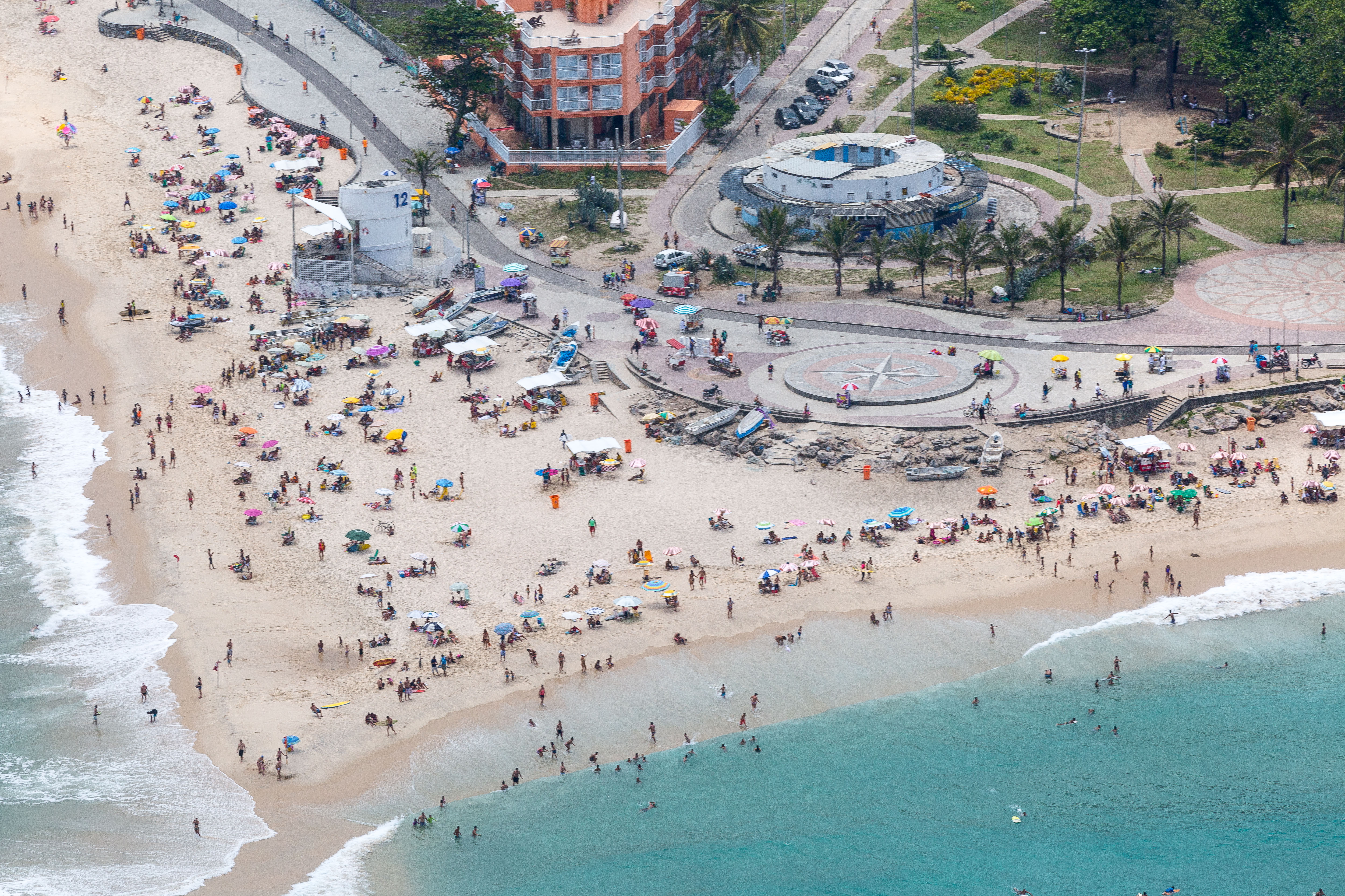 Praia do Pontal, localizada na cidade do Rio de Janeiro